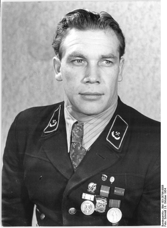 Gustav Hübner Zentralbild TBD-Schmidt 7 Motive 8.10.1954 - 2506 - Mit dem Nationalpreis 1954 ausgezeichnet. Brigadier Gustav Hübner, Deutsch-Sowjetische Wismut A.-G., Held der Arbeit, Verdienter Bergmann und dreifacher Aktivist mit dem Nationalpreis ausgezeichnet. Kollege Hübner hat als erster den mechanisierten Schnellvortrieb im gesamten Bergbau der DDR eingeführt, so daß heute Streckenvortriebe bis zu 400 m im Monat in der Wismut A.-G. erreicht werden konnten. [Porträt Gustav Hübner in Bergmannskittel mit Orden] Abgebildete Personen: Hübner, Gustav: Verdienter Bergmann, Held der Arbeit, Nationalpreis 1954, DDR